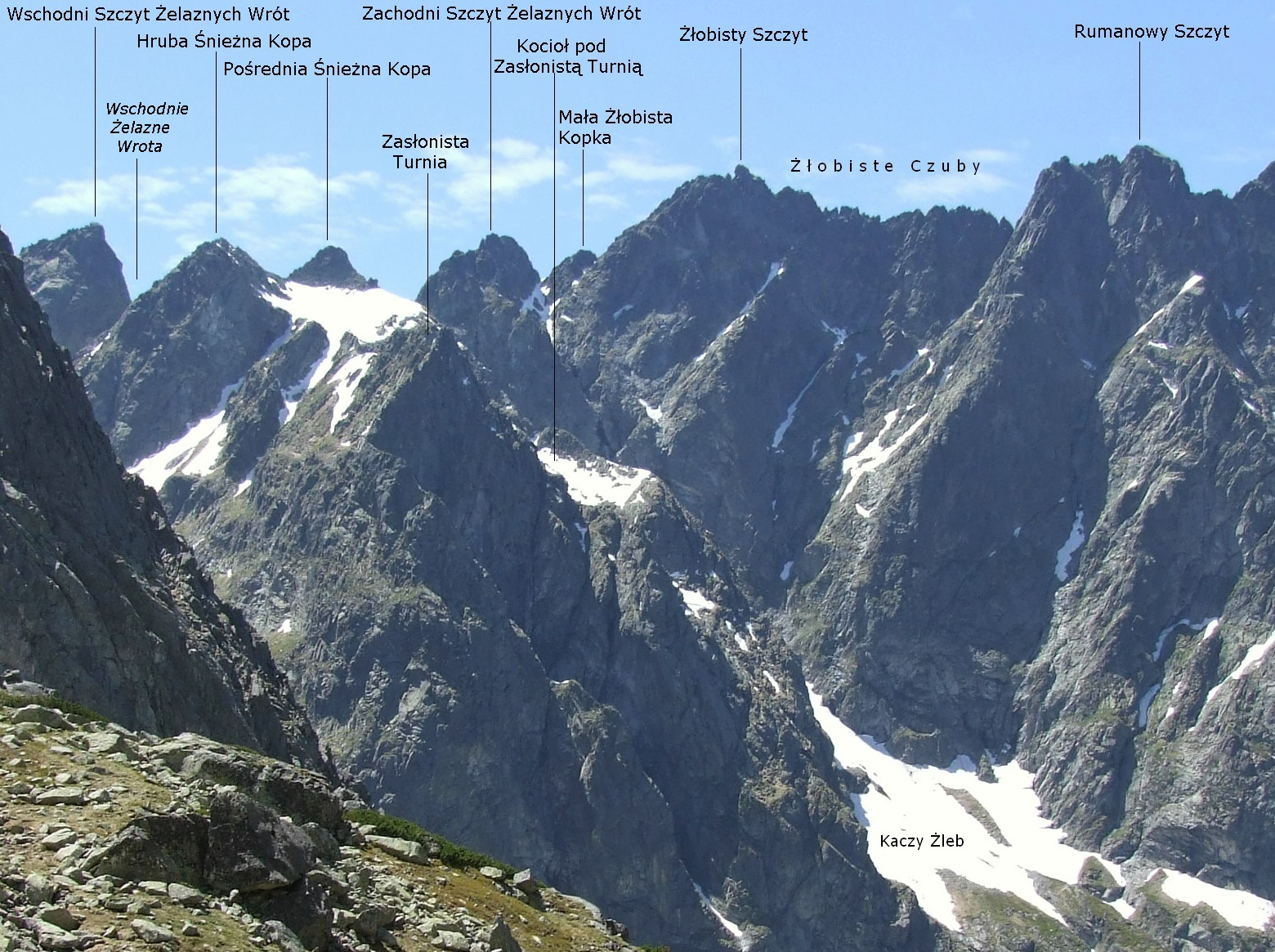 Widok z podejścia na Polski Grzebień